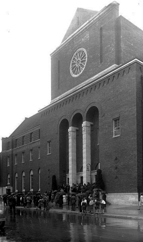 Eine neue Synagoge in Berlin Blick auf die neue Synagoge in Berlin-Wilmersdorf während der Einweihung.